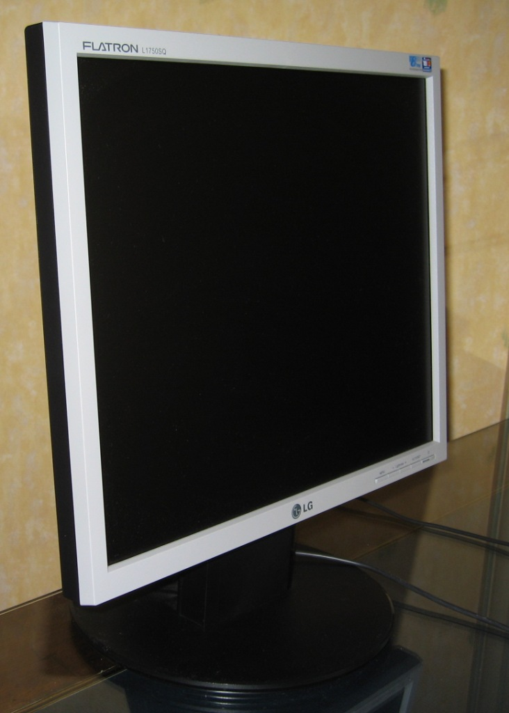 Ecran à cristaux liquides (LCD) Modèle FLATRON L1750SQ Acheté en Décembre 2005 Photographie prise le vendredi 7 Juillet 2006